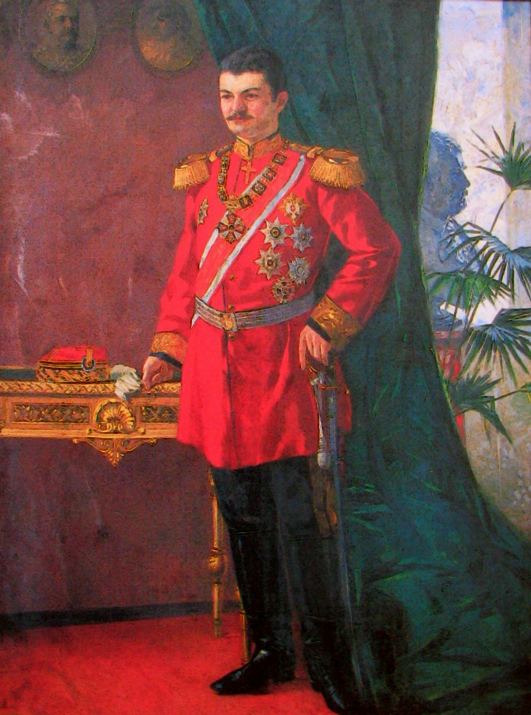 Слика: Александар Обреновић Аутор: Марко Мурат (1864-1944) Фотографисао: Бранко Д. Тодоровић Слика је у јавном власништву јер је у Хрватској до 27. јула 1999. важио закон по којем су ауторска права важила за живота аутора и 50 година након његове смрти, што значи да је ова слика прешла у јавно власништво 1. јануара 1995. године. У међувремену је донесен нови закон према којем је период заштите ауторских права повећан са 50 на 70 година од ауторове смрти, али се закон не примењује ретроактивно на дела која су у моменту његовог доношења већ била у јавном власништву. Аутор је један део живота провео у Србији. До 2004. године је и у Србији важио закон по којем су имовинска права аутора била заштићена за живота аутора и 50 година после његове смрти, па је и према законима Србије дело прешло у јавно власништво 1. јануара 1995.